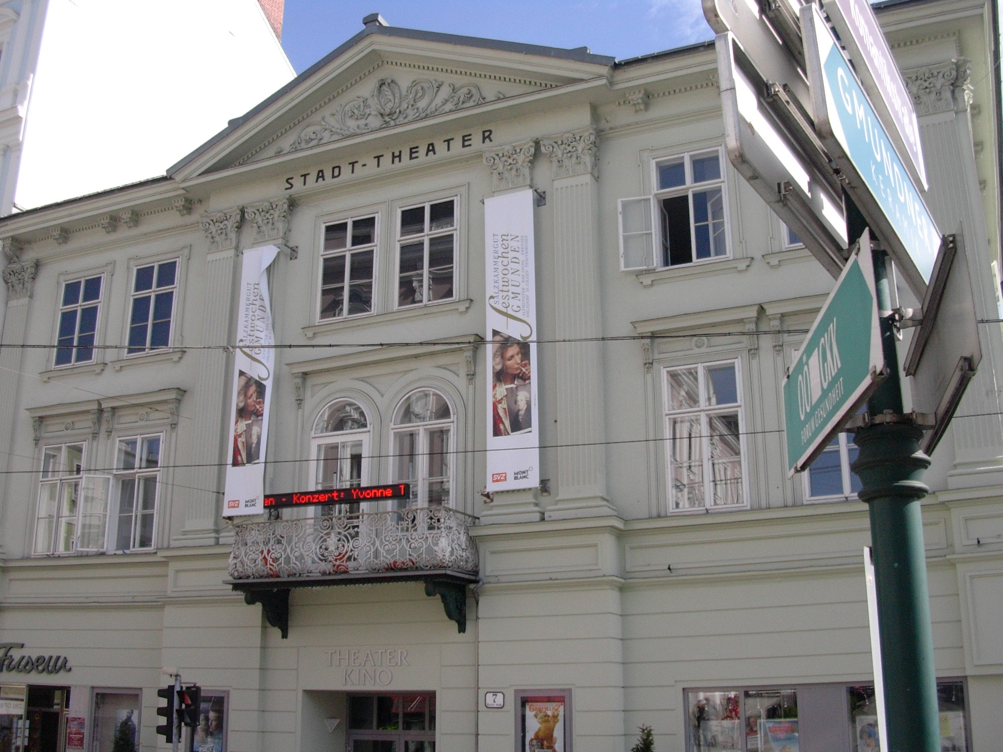 Stadttheater